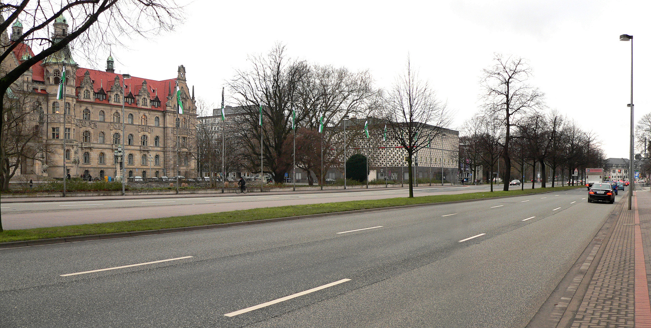 Friedrichswall